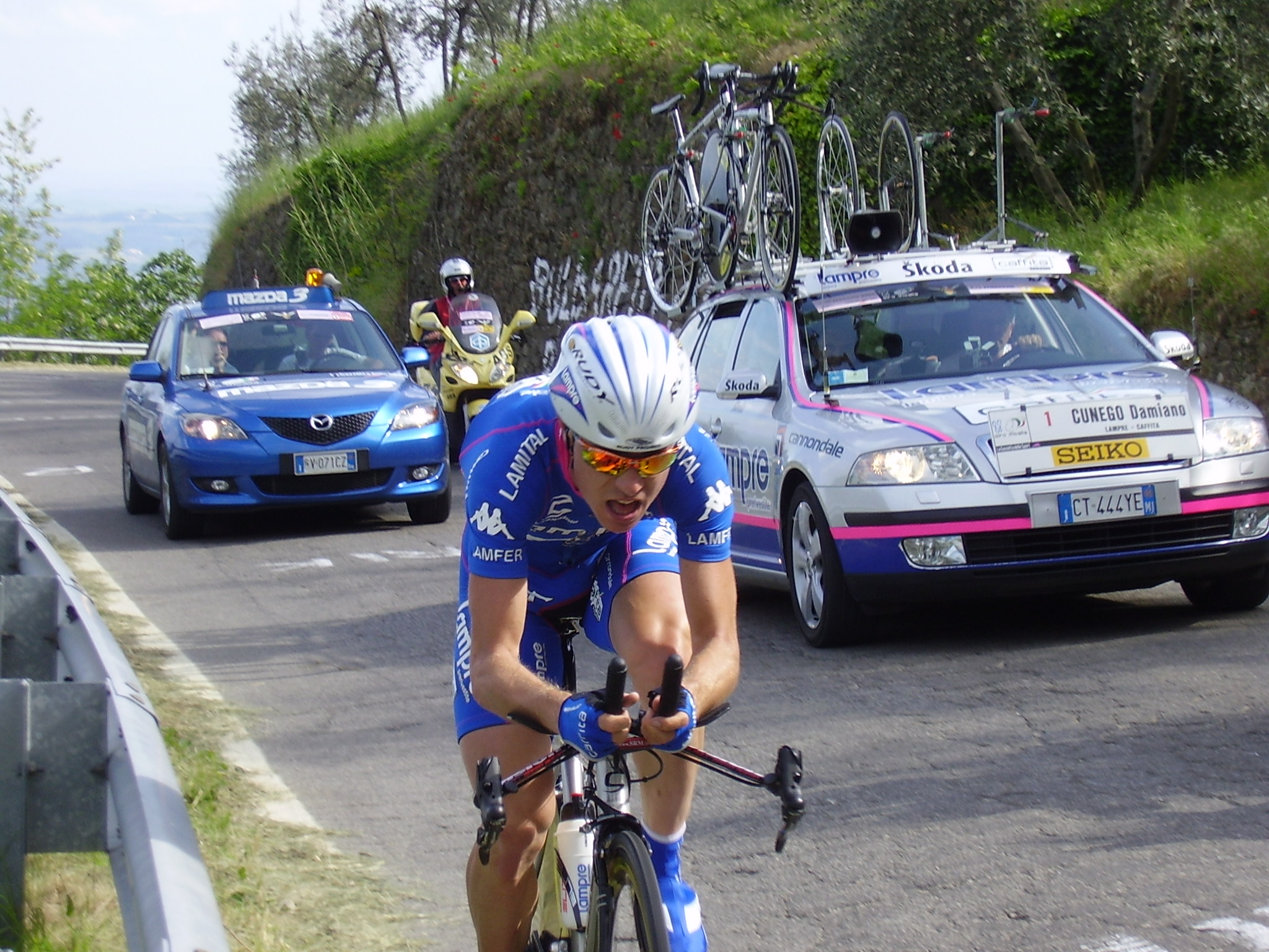 Damiano Cunego at 88th Giro'd Italia (2005).